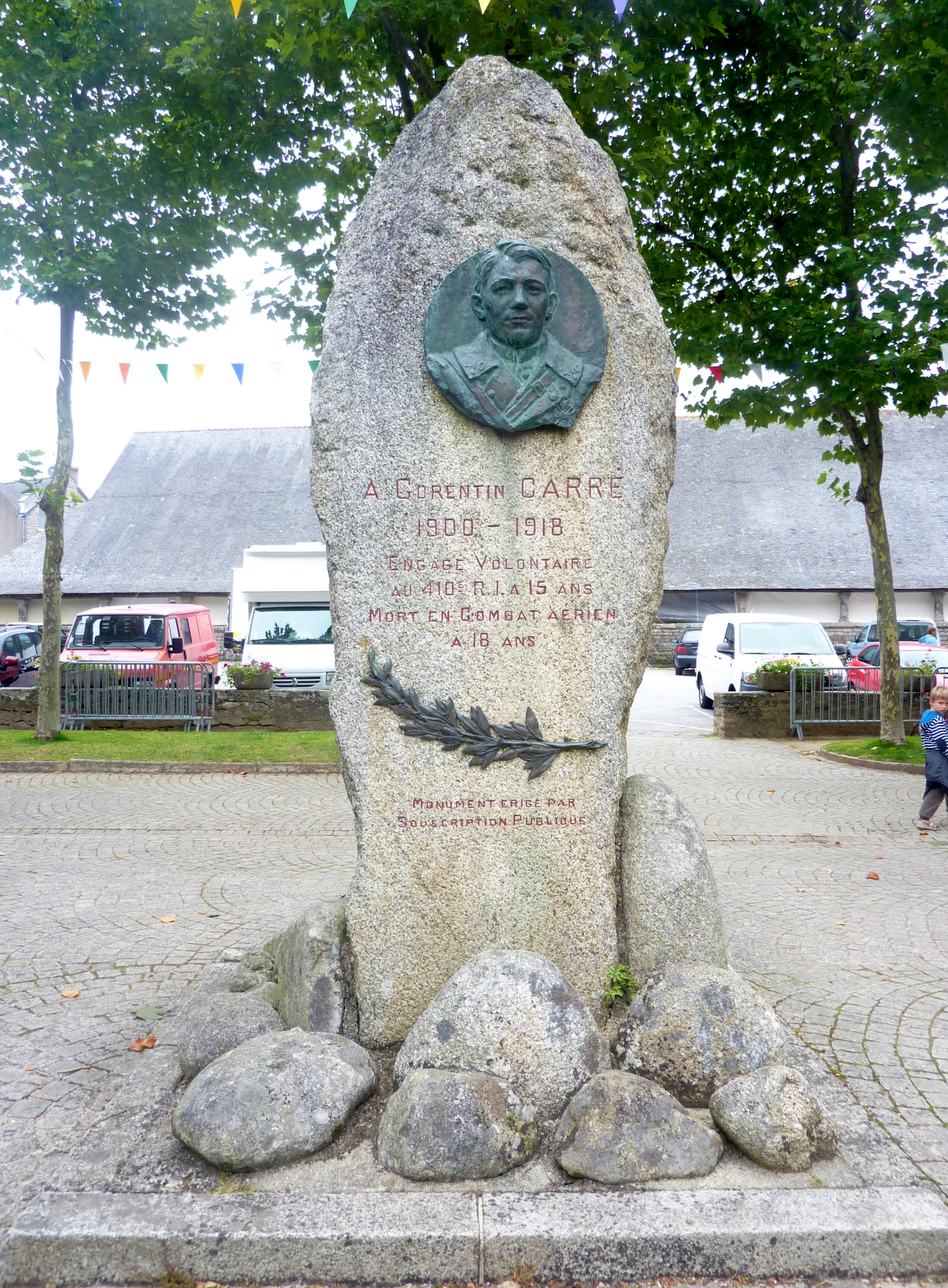 Le Faouët : le monument commémoratif en l'honneur de Corentin Carré (sur la place centrale de la ville)